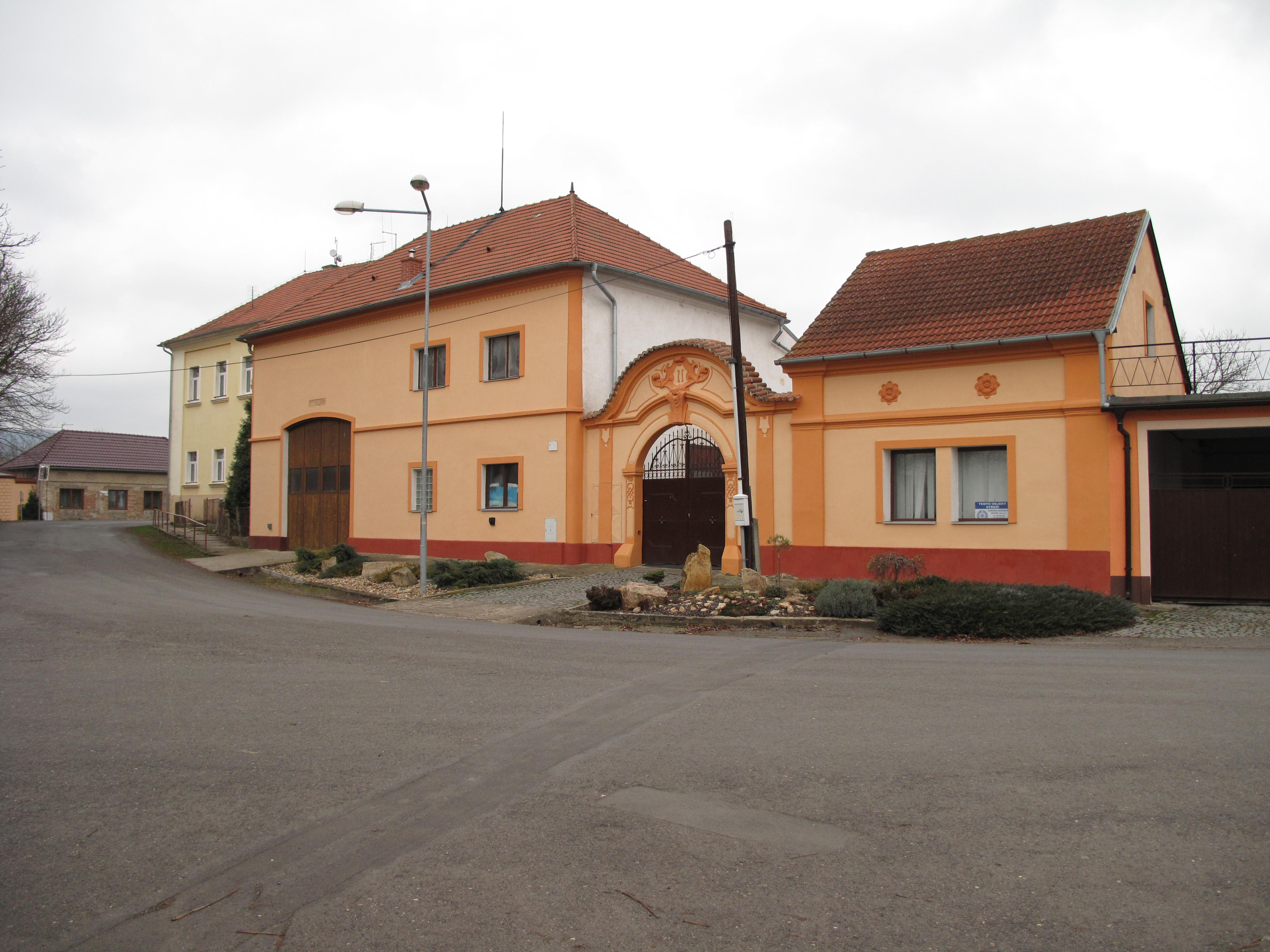 Statek v Solanech. Okres Litoměřice, Česká republika.